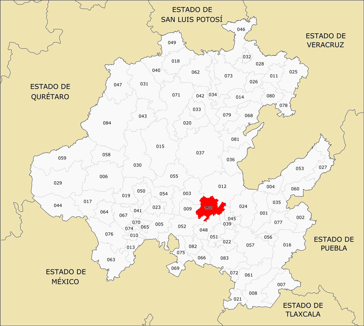 Municipios de Hidalgo